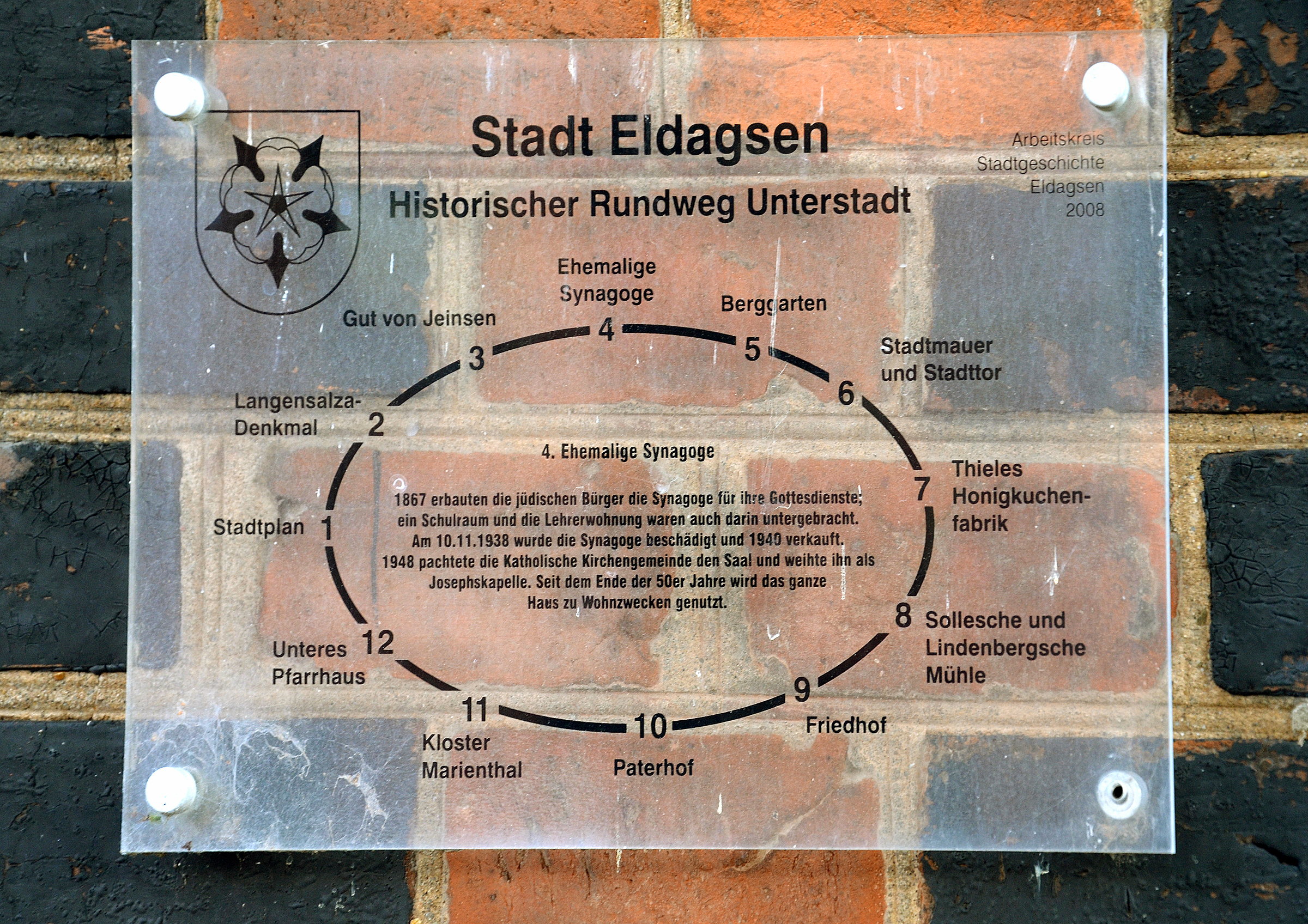 Station 4 in Eldagsen auf dem 2008 vom Arbeitskreis Stadtgeschichte Eldagsen entwickelten Historischen Rundgang Unterstadt „4. Ehemalige Synagoge“ „1867 erbauten die jüdischen Bürger die Synagoge für ihre Gottesdienste; ein Schulraum und die Lehrerwohnung waren auch darin untergebracht. Am 10.11.1938 wurde die Synagoge beschädigt und 1943 verkauft. 1948 pachtete die Katholische Kirchengemeinde den Saal und weihte ihn als Josephskapelle.Seit dem Ende der 50er Jahre wird das ganze Haus zu Wohnzwecken genutzt.“ ...